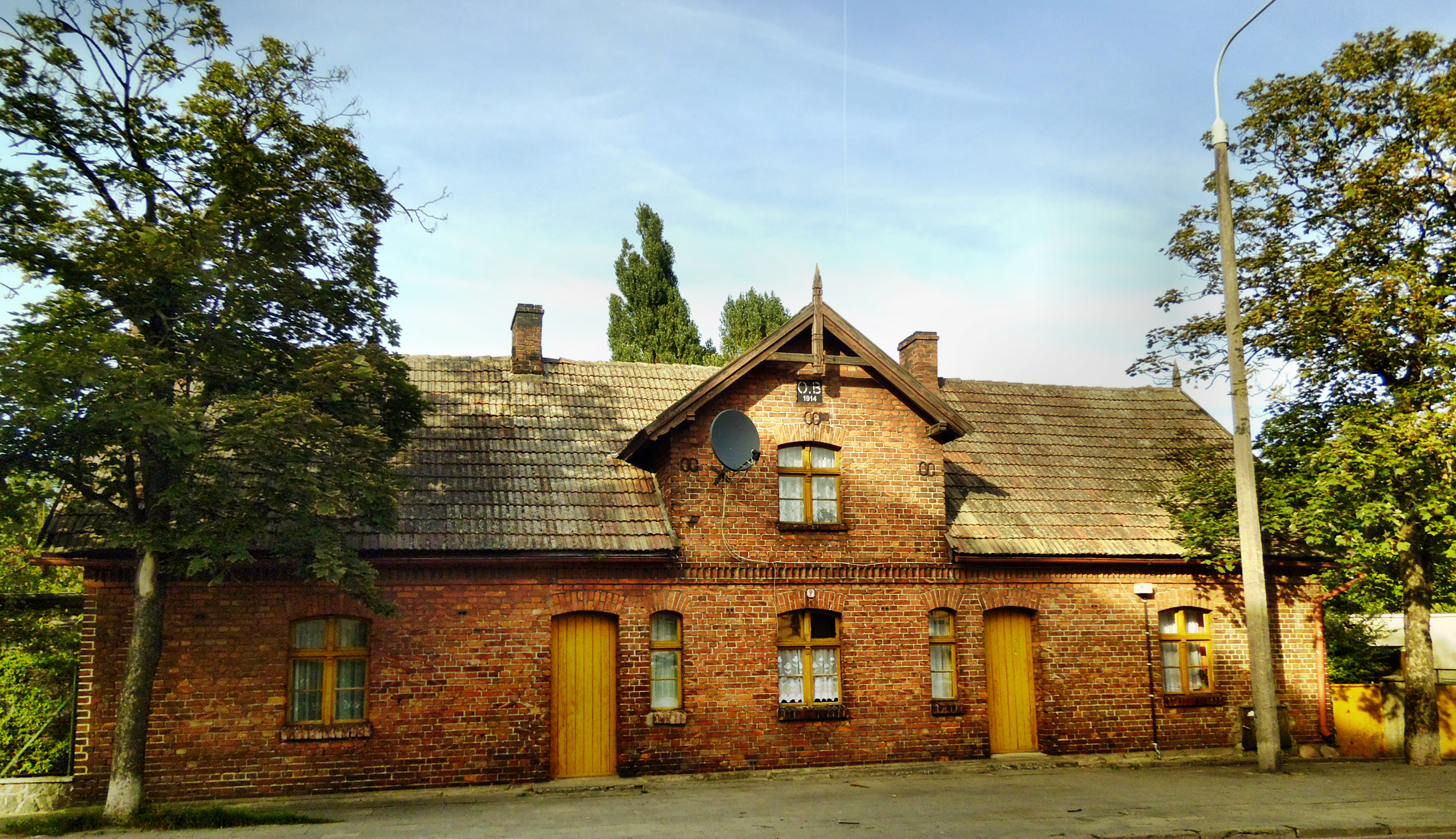 Gdynia, ul. Św. Mikołaja 9 - przedwojenny budynek mieszkalny